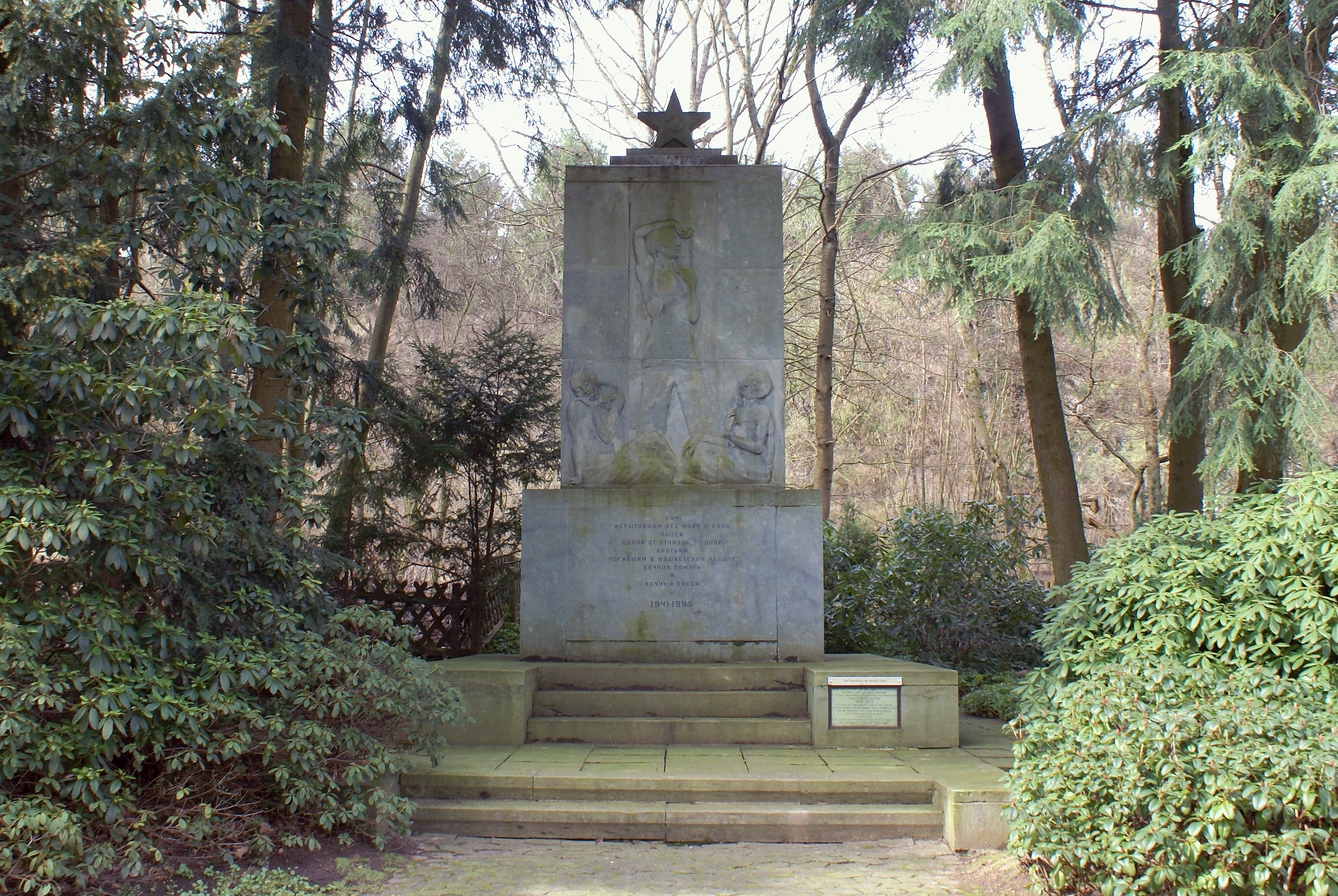 Kriegsgräberstätte Duloh des Stammlagers VI A in Hemer